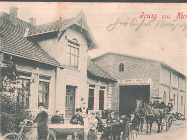 Kummerfeld, Hatjes Gasthof